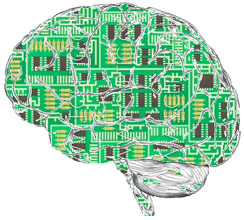 Yapay zeka uygulamaları gün geçtikçe gelişmeye ve insan zekasını yakalamaya doğru adım adım ilerlemektedir.